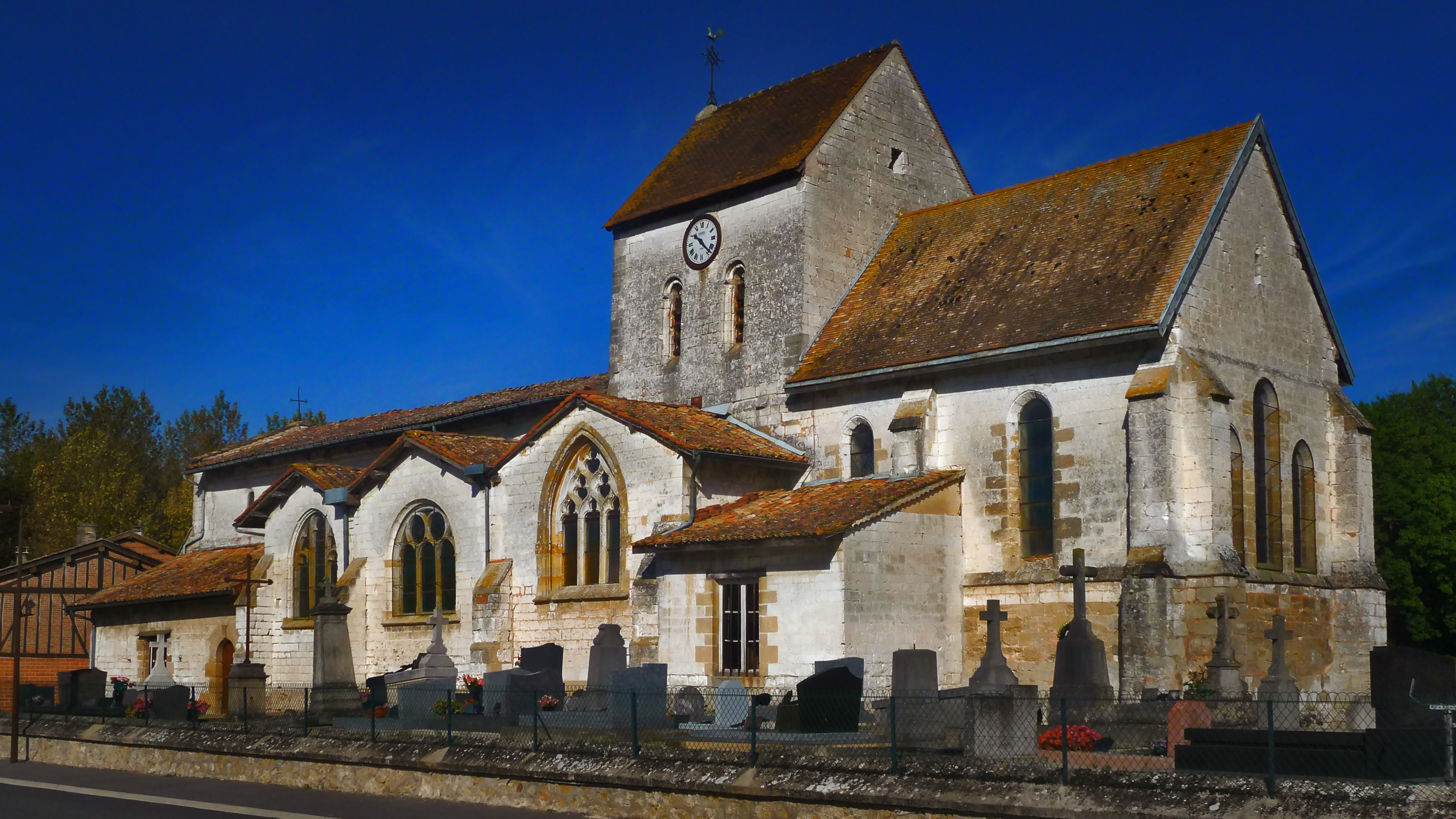 L'église Saint-Memmie, classée, fut plusieurs fois remaniée. C'est sans doute la plus récente des églises de Courtisols. Elle est mentionnée pour la première fois en 1232, mais, le style roman en témoigne, elle est plus ancienne. La nef romane, plafonnée et dotée de chapiteaux romans, communique avec les collatéraux par de grandes arcades brisées. La croisée du transept, qui possède de curieux chapiteaux, la tour carrée et le chevet rectangulaire furent édifiés à la fin du XIIe siècle. Les bras du transept sont flamboyants et la chapelle sud de style renaissance. La façade occidentale, reconstruite au XIVe siècle, a été fortement endommagée par les intempéries. Dans le collatéral méridional, une fenêtre à meneaux indique l'emplacement de l'école sous l'Ancien régime. .